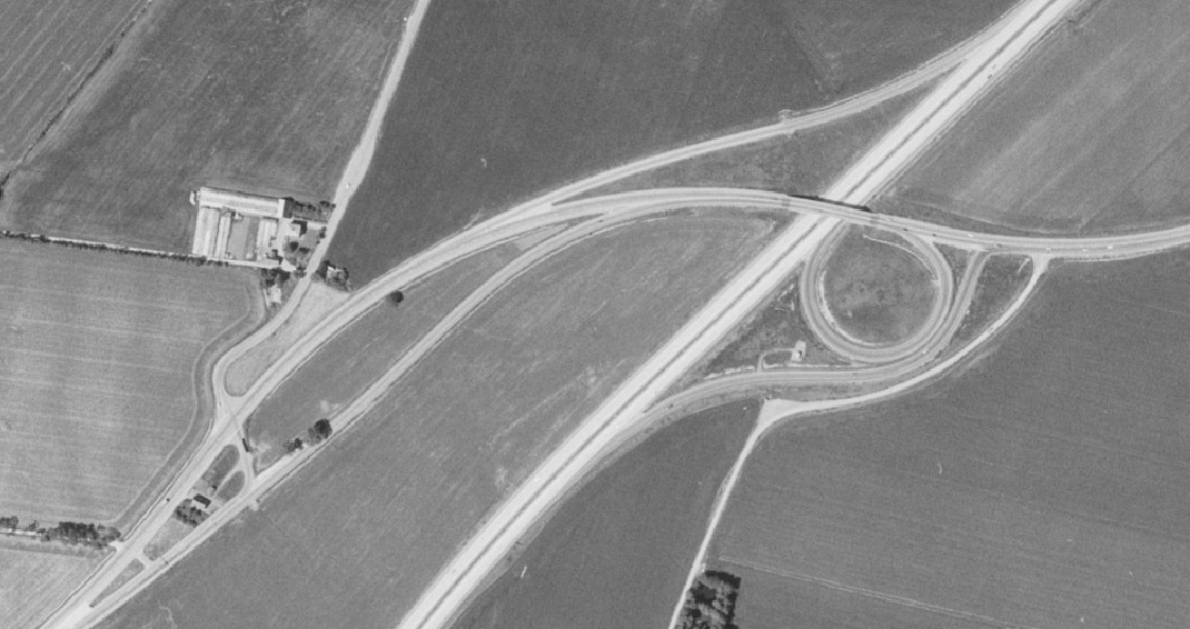 Historiska flygfoton från Lantmäteriet föreställandes Trafikplats Djurhagshaus utanför Helsingborg.